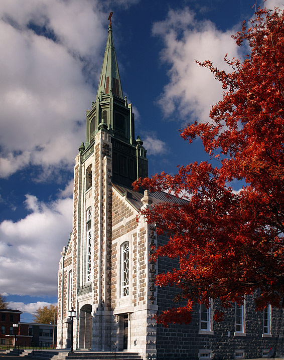 Eglise catholique Saint-Michel située 965 rue Principale à ROUGEMONT (Montérégie) - Québec